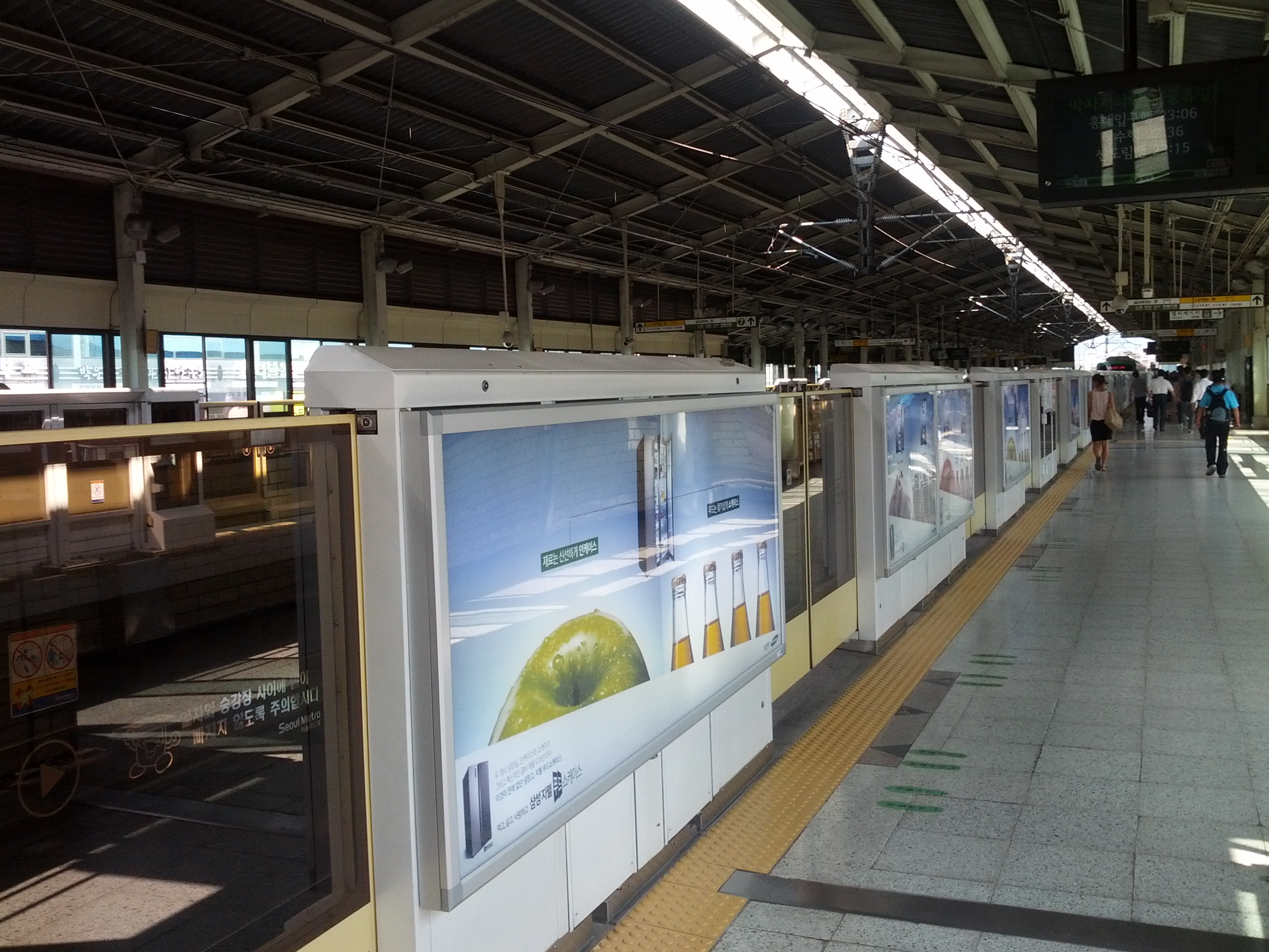 2호선 건대입구역 승강장